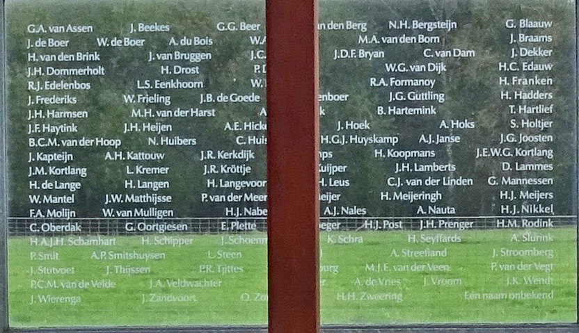 Oorlogsmonument gemaakt door Tirza Verrips bij de Woeste Hoeve ter nagedachtenis aan de 117 mensen die hier op 8 maart 1945 gefusilleerd werden